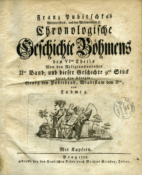 obálka knihy Chronologische geschichte Böhmens